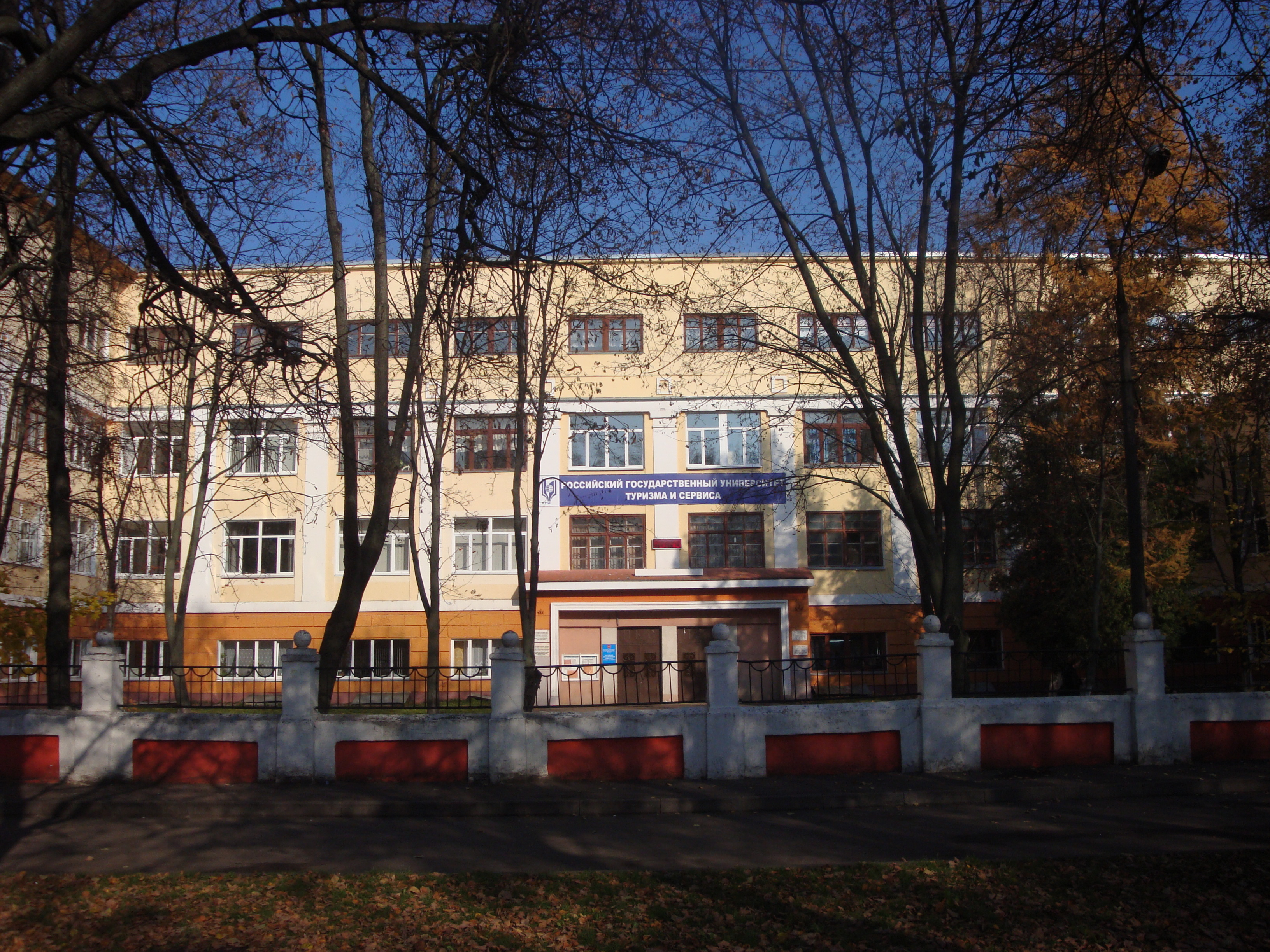 Российский государственный университет туризма и сервиса в Подольске